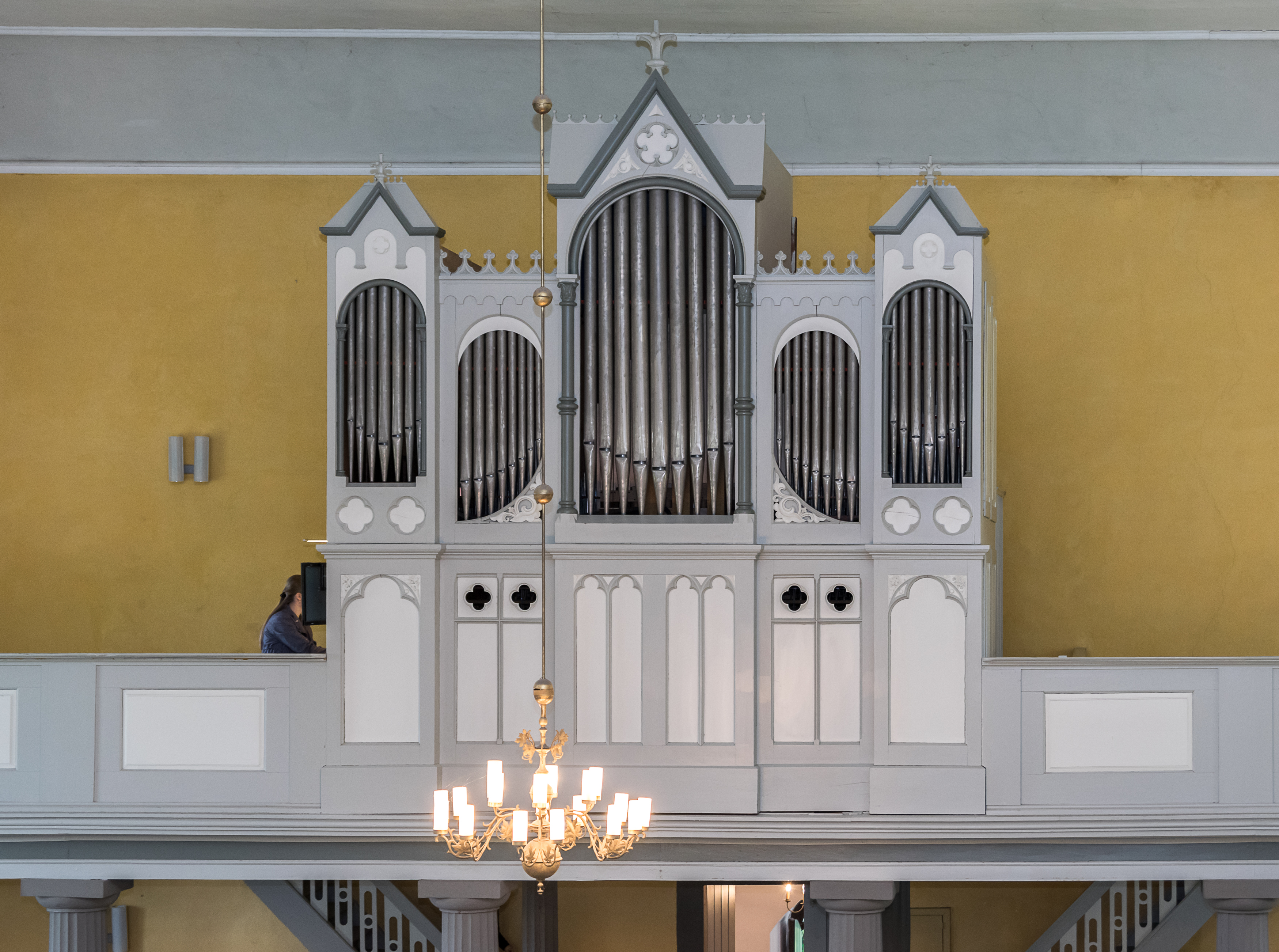 Evangelisch-refomierte Kirche in Blomberg-Cappel; Randebrock-Orgel von 1865 oder 1868